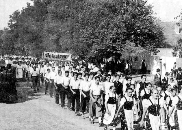 Parade des Schwäbisch-Deutschen Kulturbundes anlässlich der 175 Jahr-Feier in Filipowa, 1938